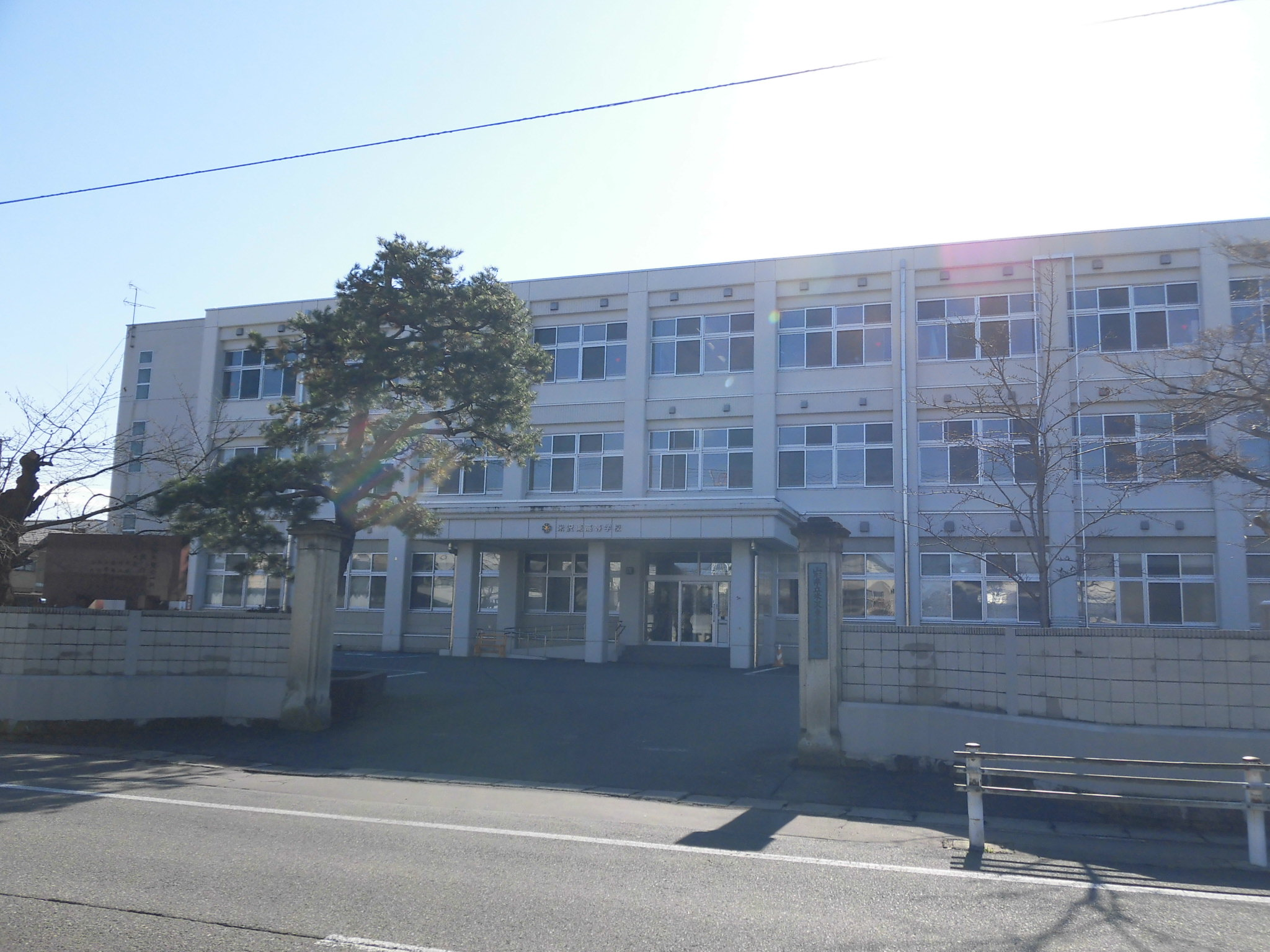 山形県立米沢東高等学校。山形県米沢市に所在。